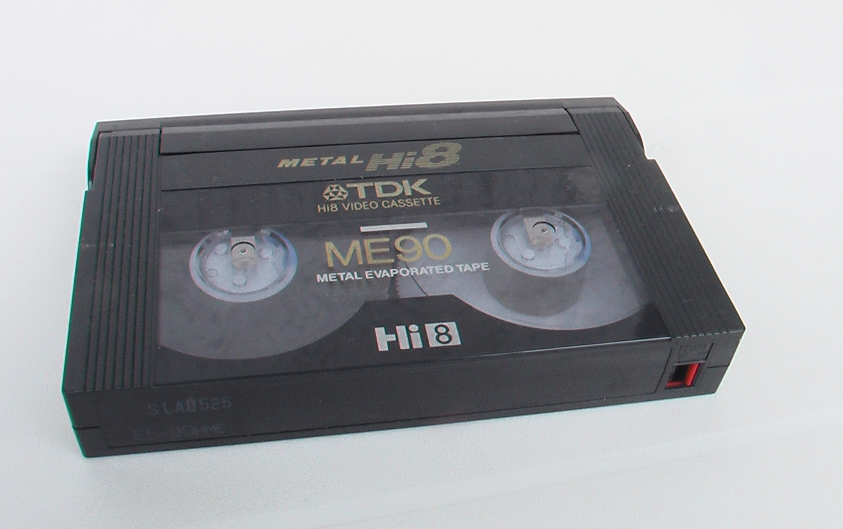 Hi8VideoCasetteTDK